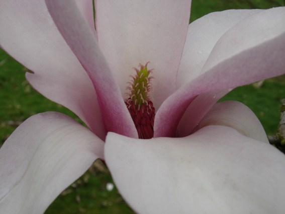 Magnolia 'Ann Rosse' (Arboretum Wespelaar, België). Treseder (1984). (M. denudata × M. sargentiana 'Robusta')